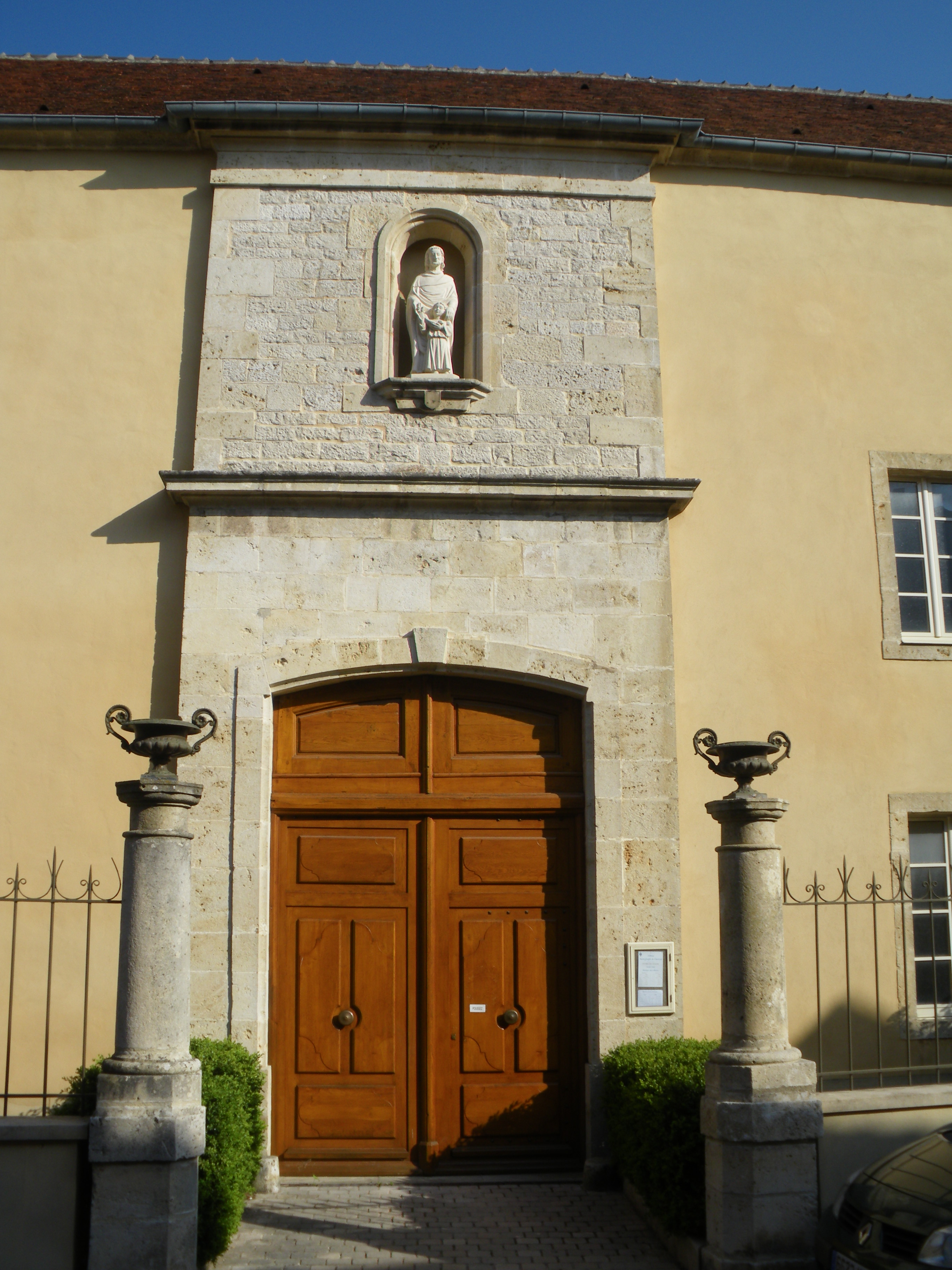 Flavigny sur Ozerain porte de l'Abbaye Saint Joseph